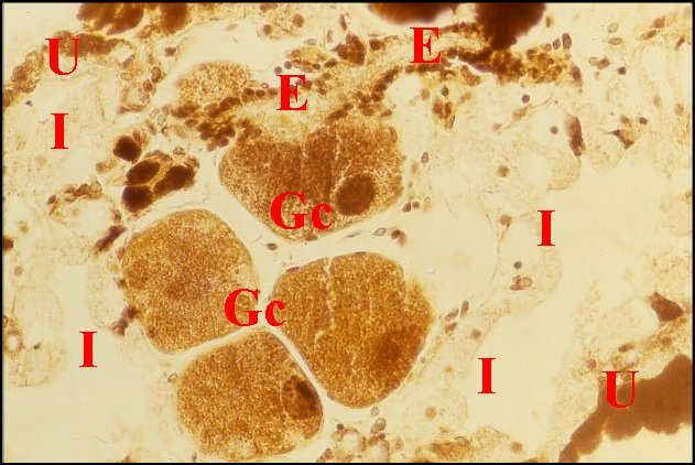 Glande botryoide de Kaira immature